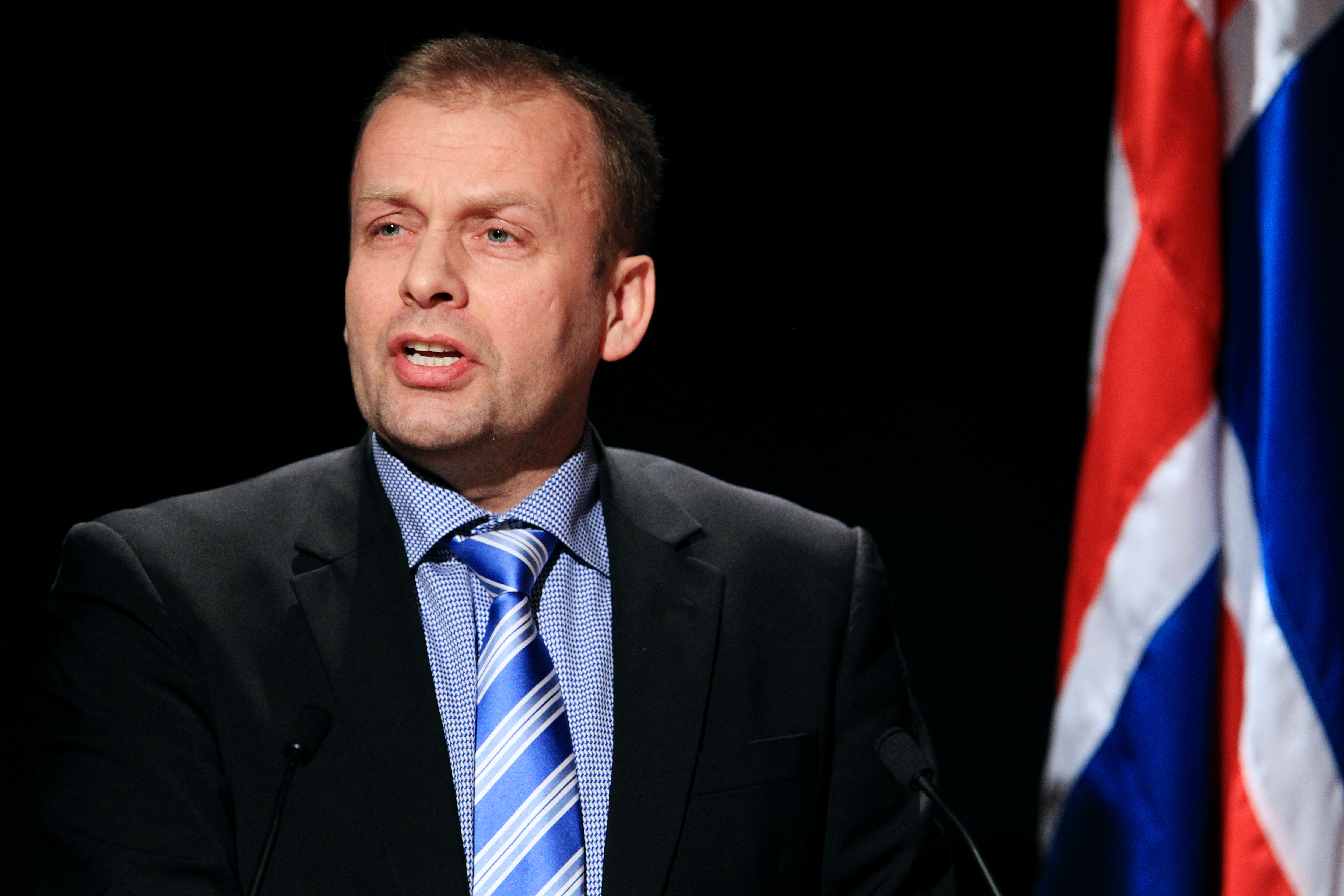 Kaj Leo Johannesen, lagman Färöarna, talar vid Nordiska rådets session.